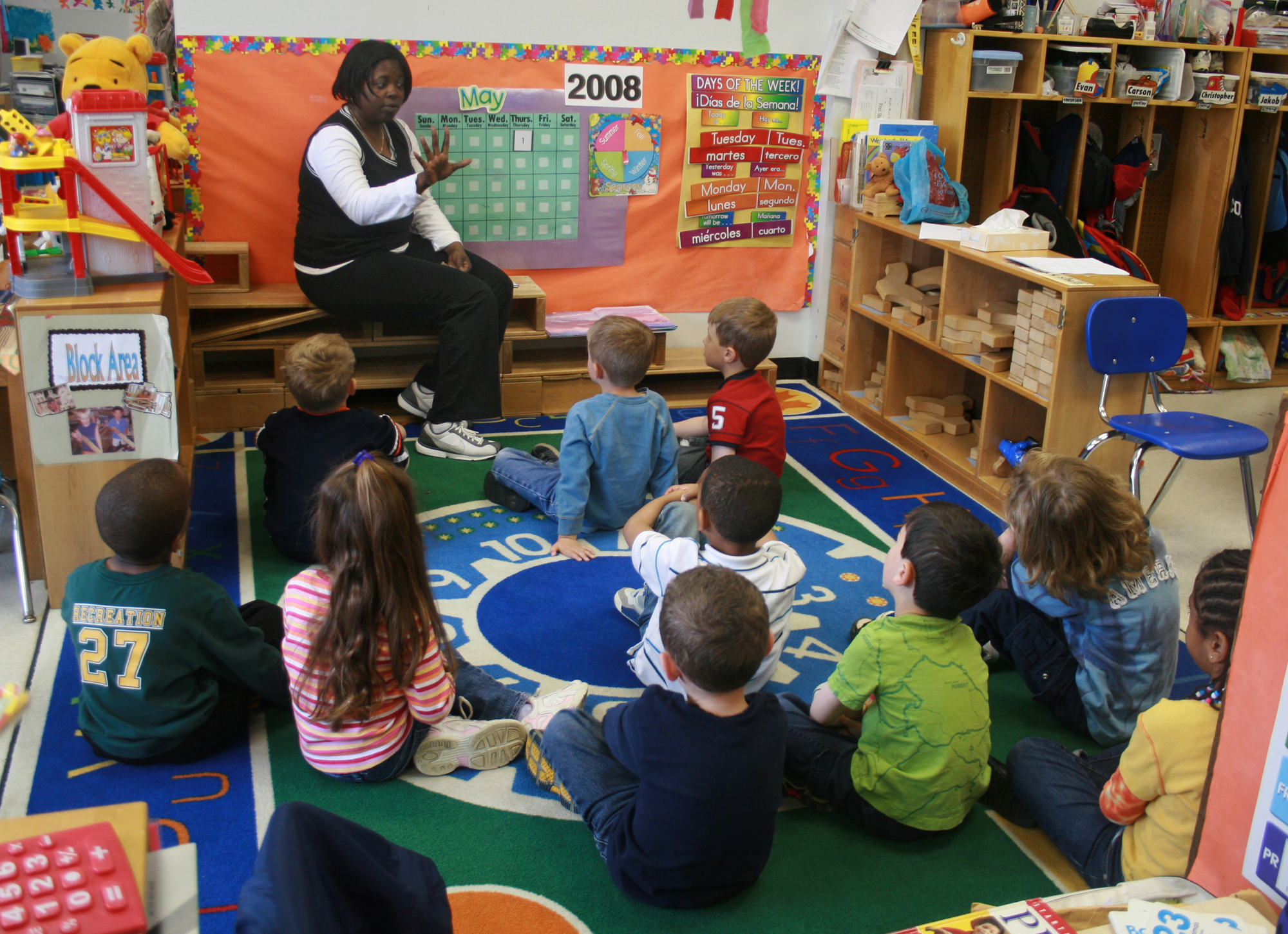 Teacher teaching students in an early childhood setting.